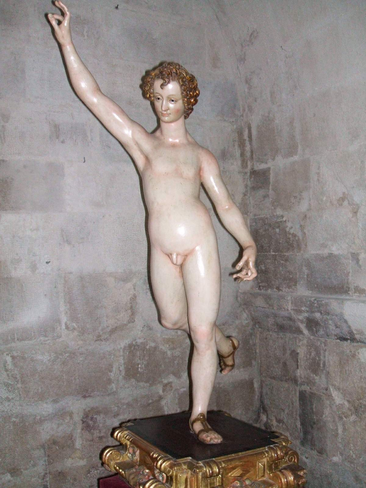 Museo Diocesano y Catedralicio de Valladolid, Capilla de San Llorente, Arcángel San Gabriel, de Gregorio Fernández (1612)